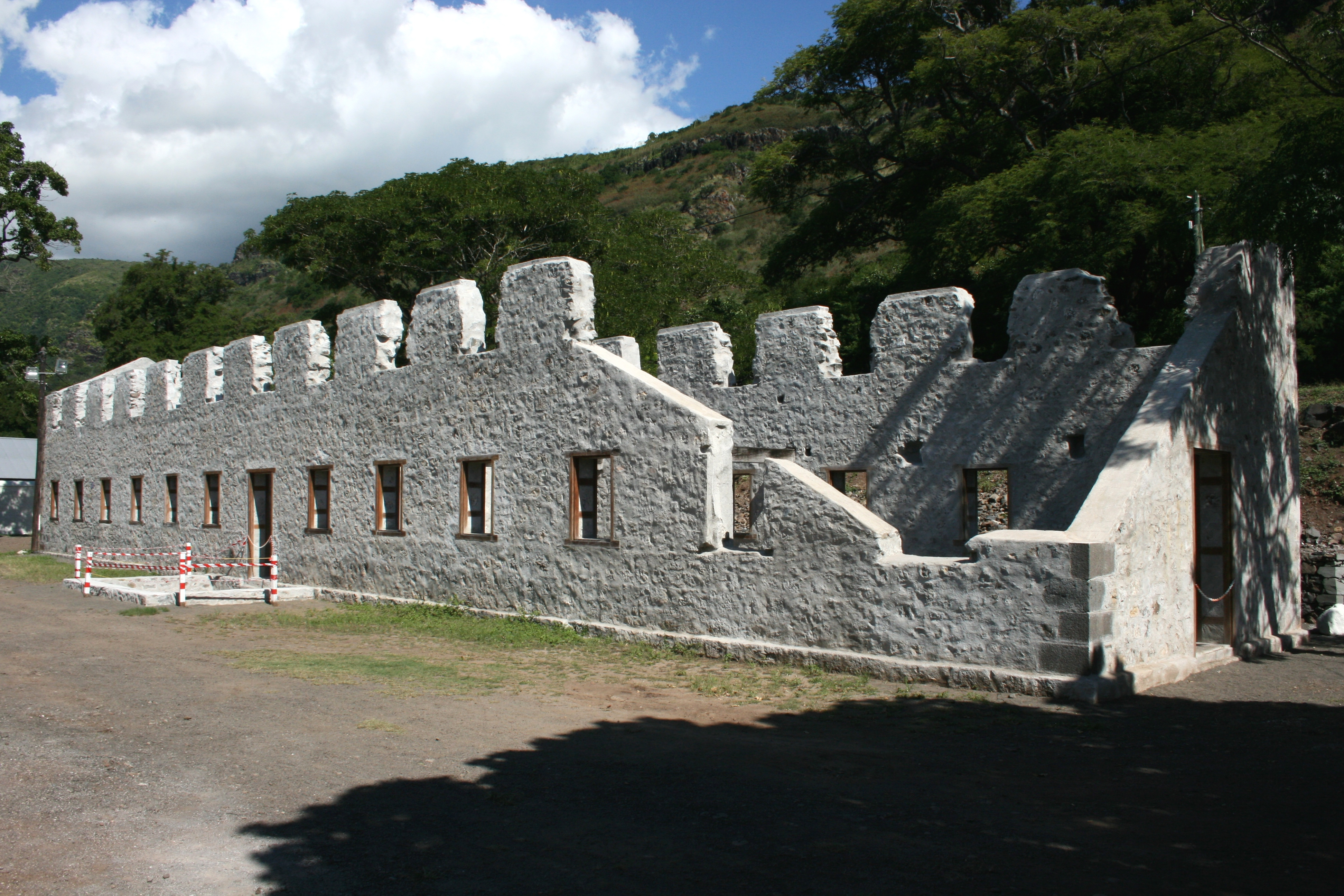 Vue du dortoir du premier des lazarets de la Grande Chaloupe, à La Réunion.